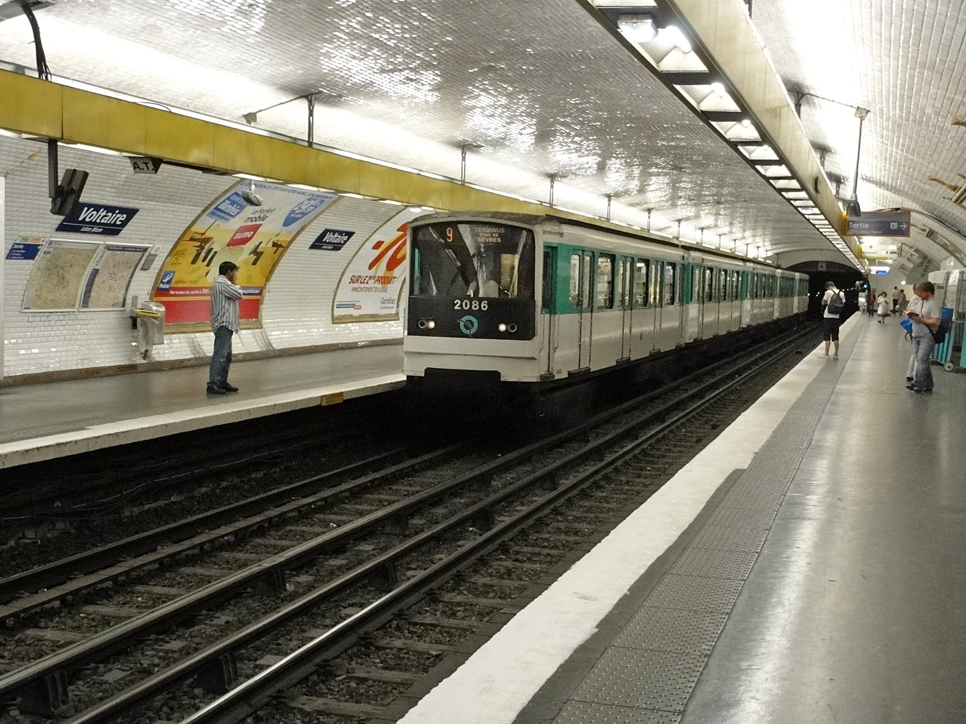 Station Voltaire de la ligne 9 du métro de Paris, France.